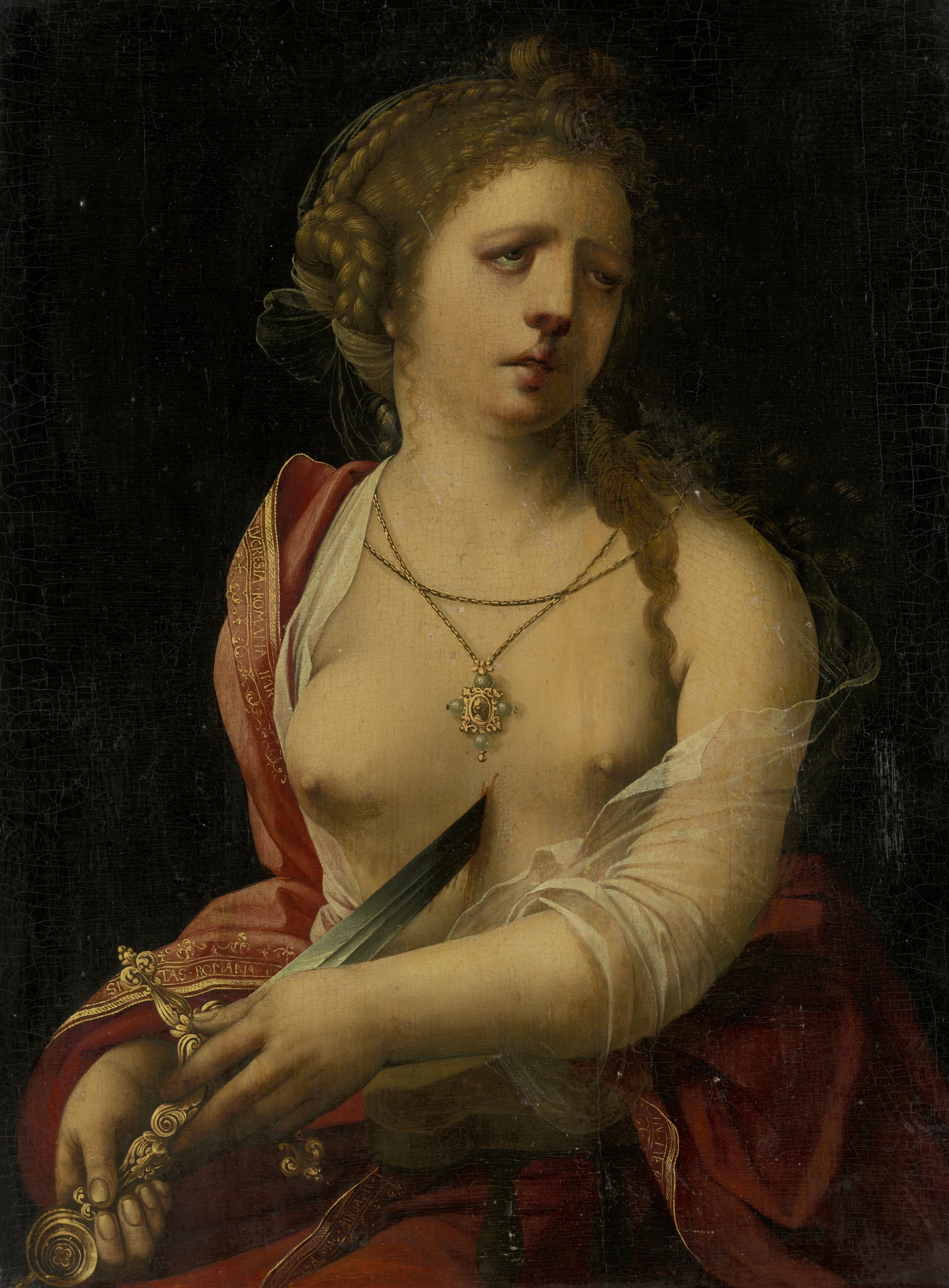 De zelfmoord van Lucretia. Halffiguur van Lucretia die, zittend in een stoel, een dolk in haar borst steekt.